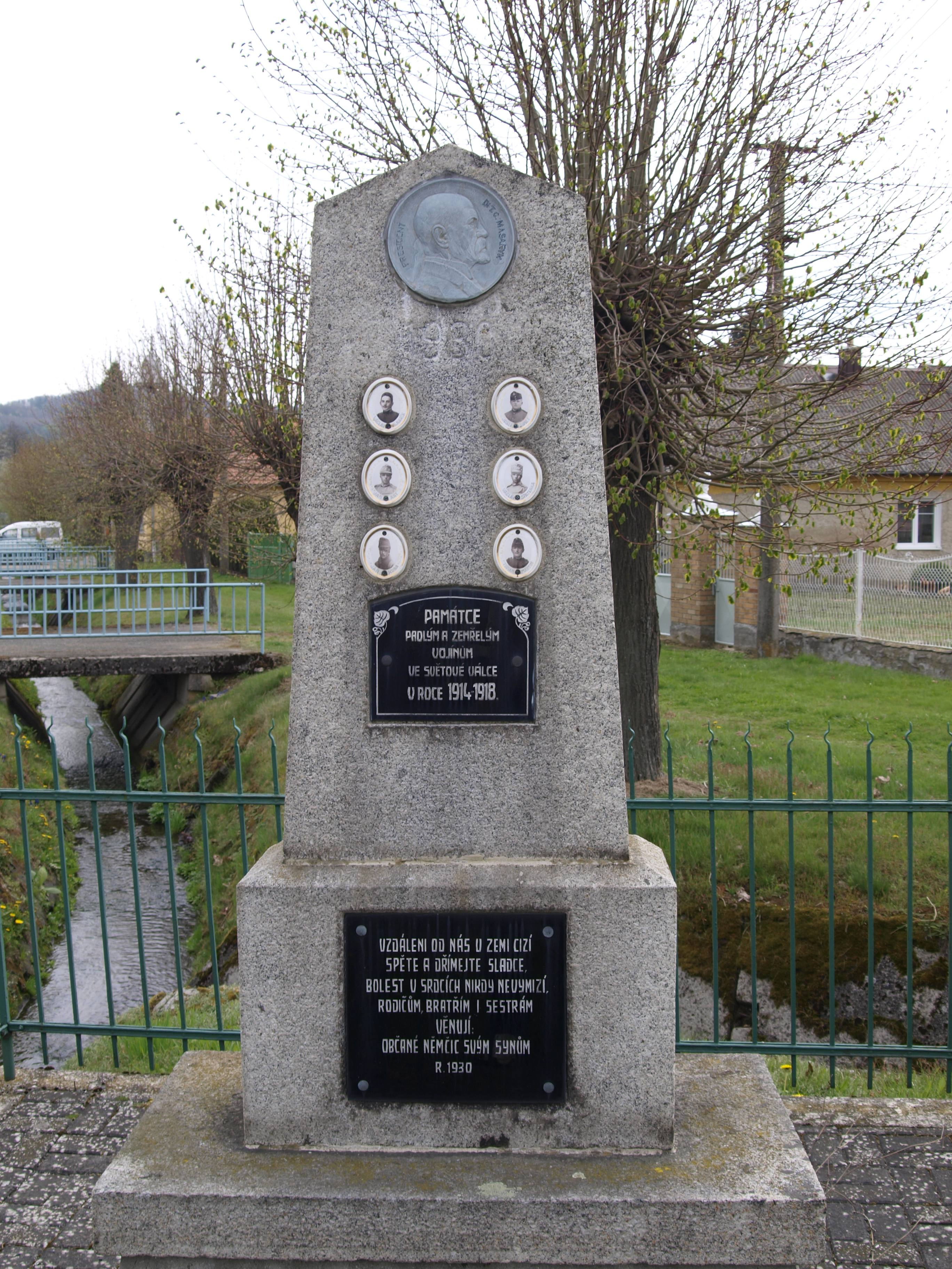 Obec Němčice (okres Domažlice), pomník památce padlým ve světové válce Project: Fotíme Česko